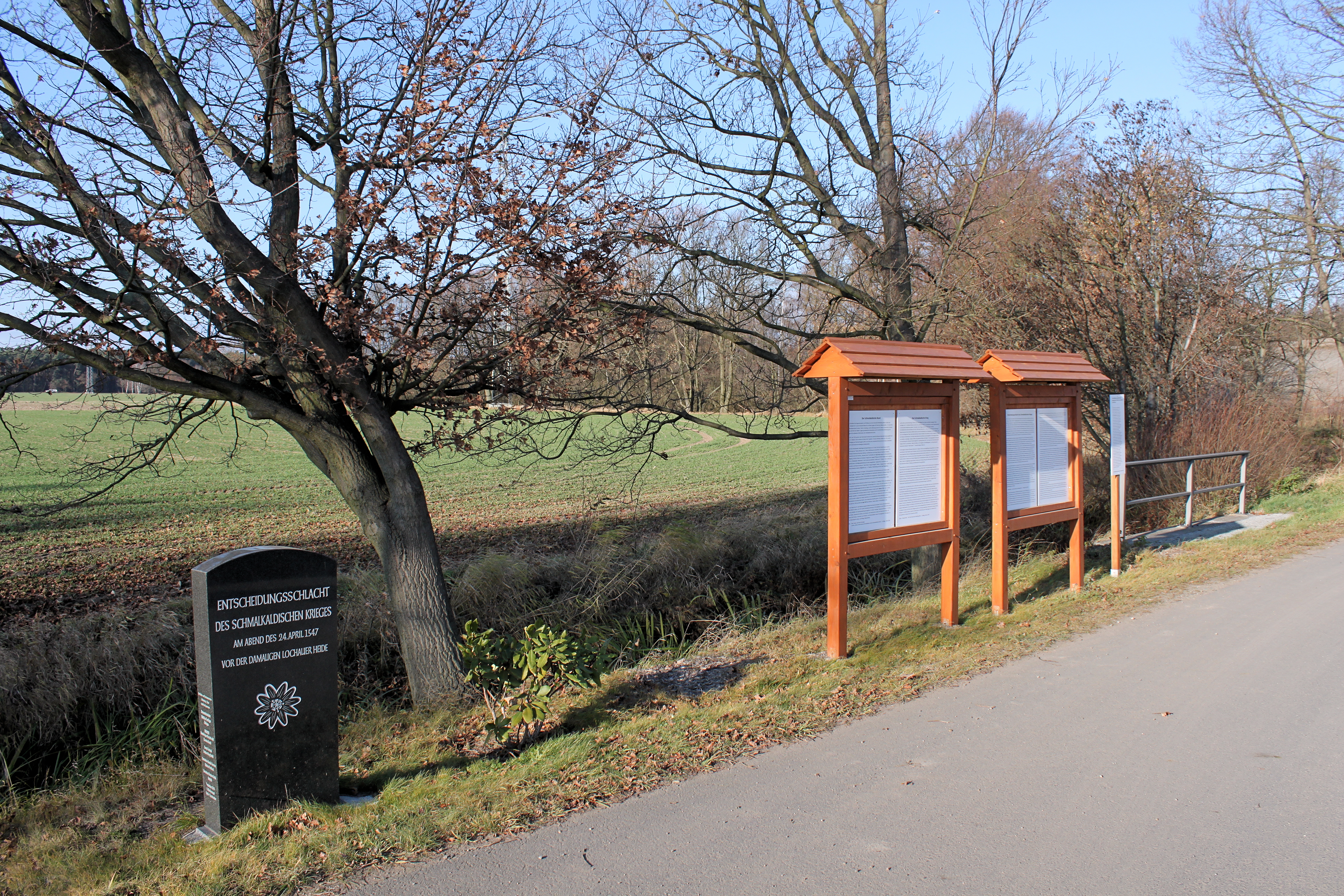 Gedenkstein und Tafeln zum Finale der Schlacht bei Mühlberg nahe Falkenberg/Elster